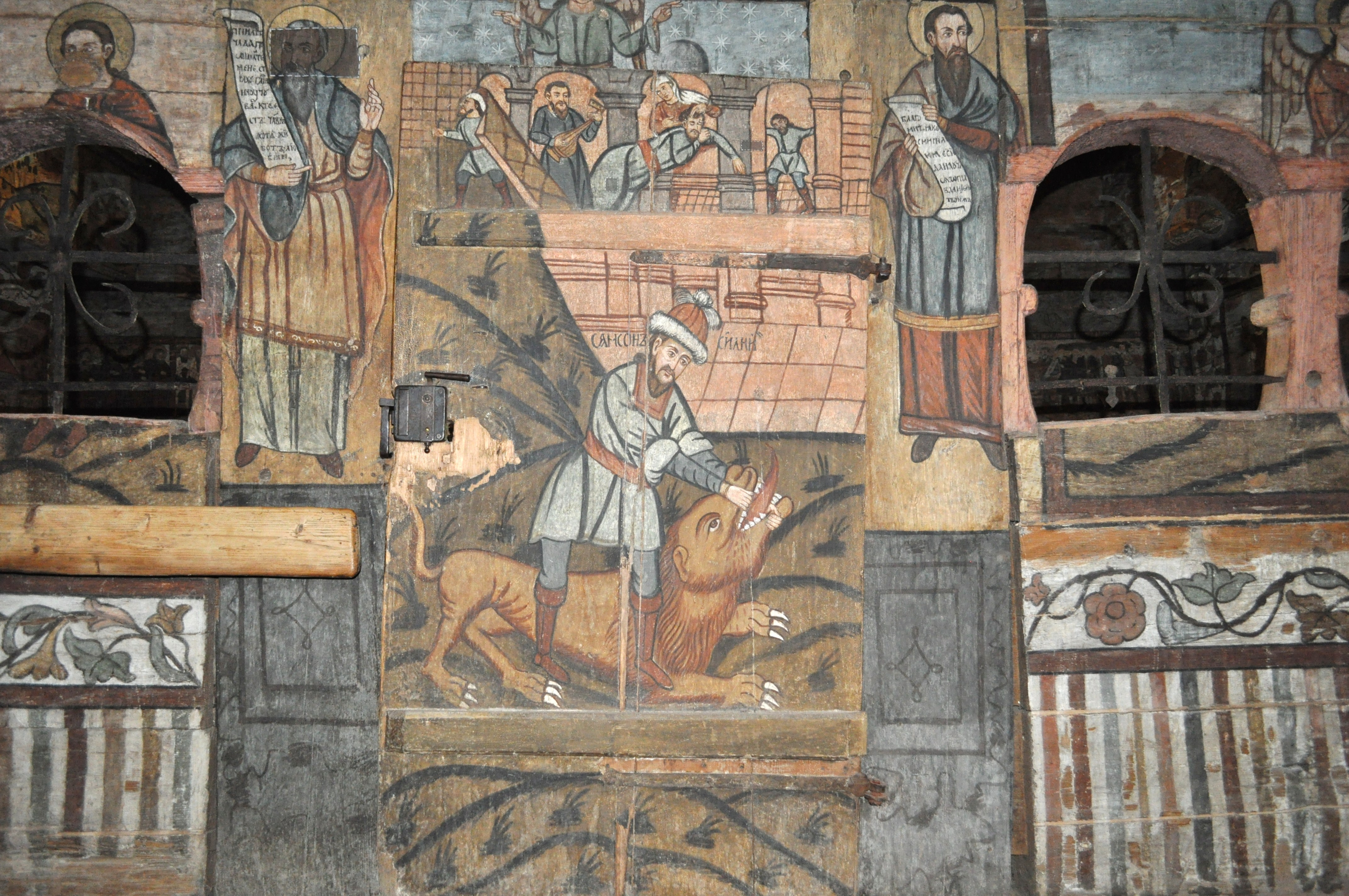 Biserica de lemn "Sfântul Nicolae", sat BOGDAN VODĂ